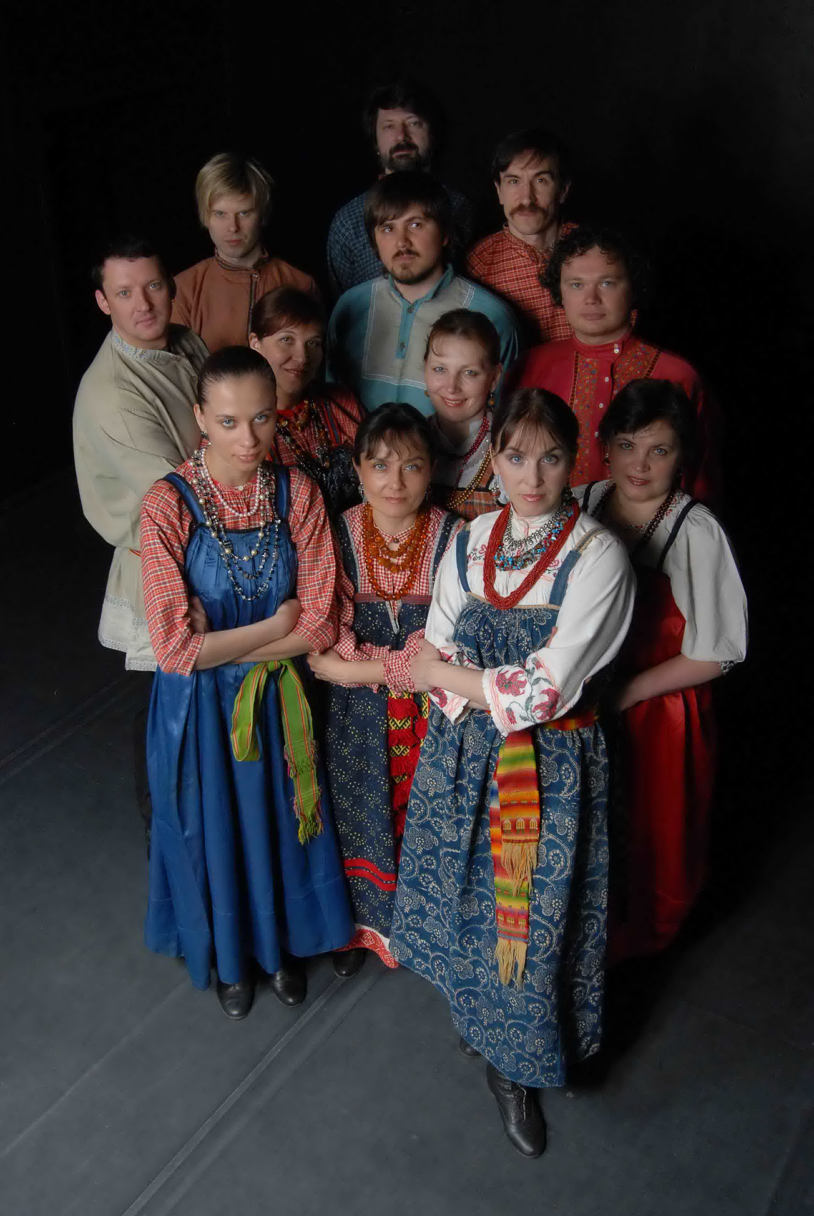 Фотография с репетиции Ансамбля Дмитрия Покровского. Театр на Таганке. 2009 год.